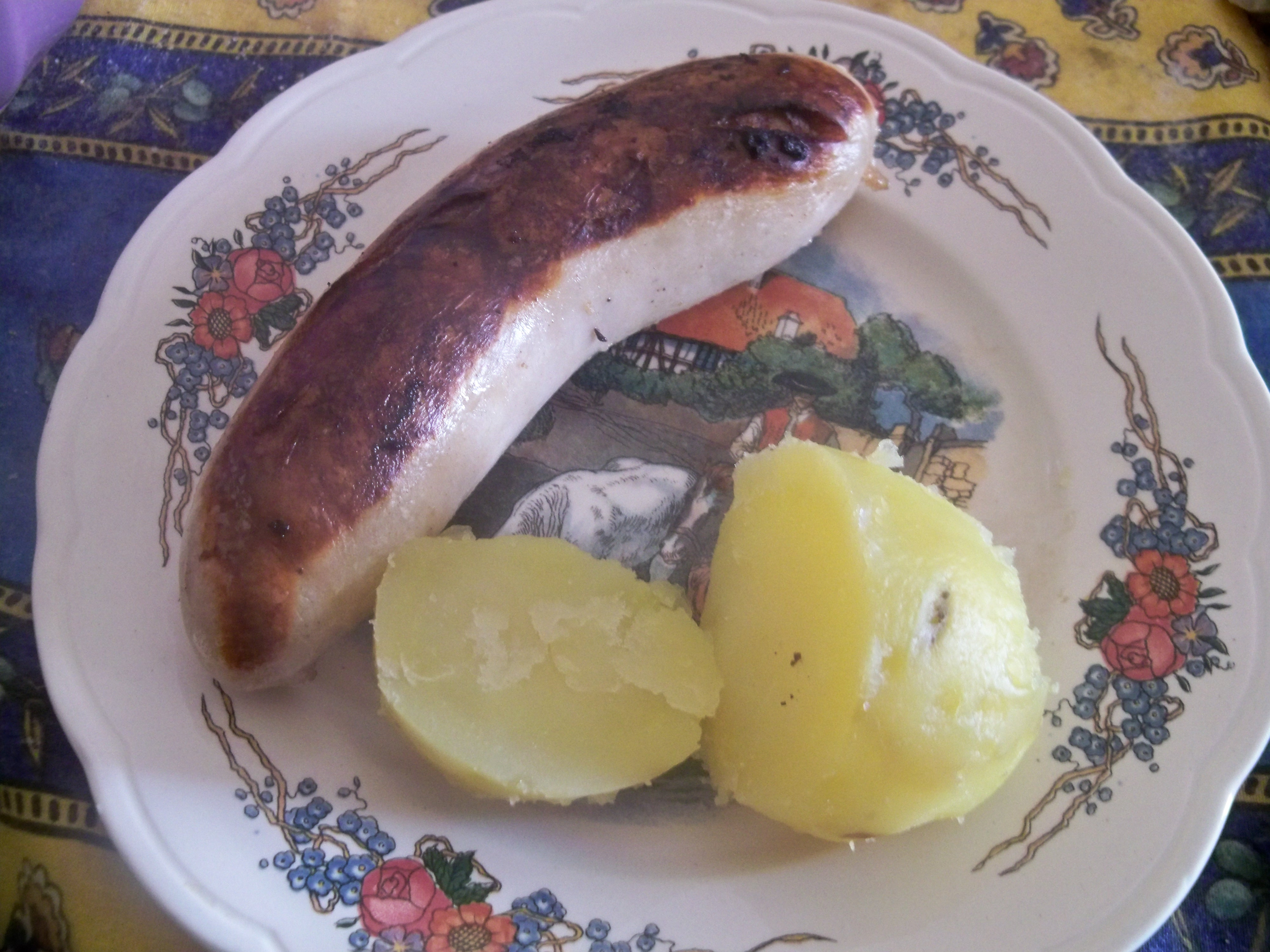 Saucisse blanche d'Alsace